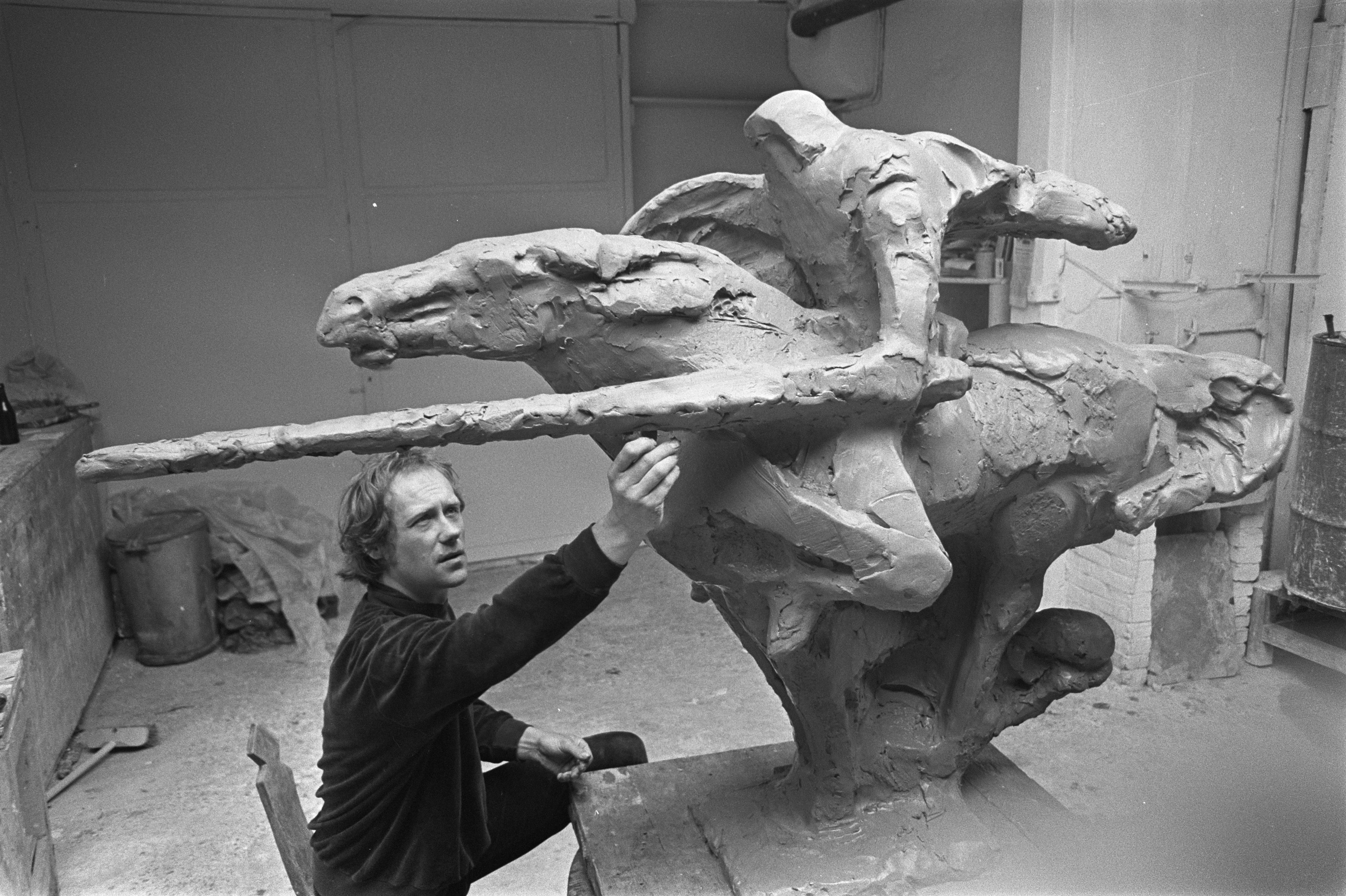 Beeldhouwer Eric Claus in zijn atelier (1968)